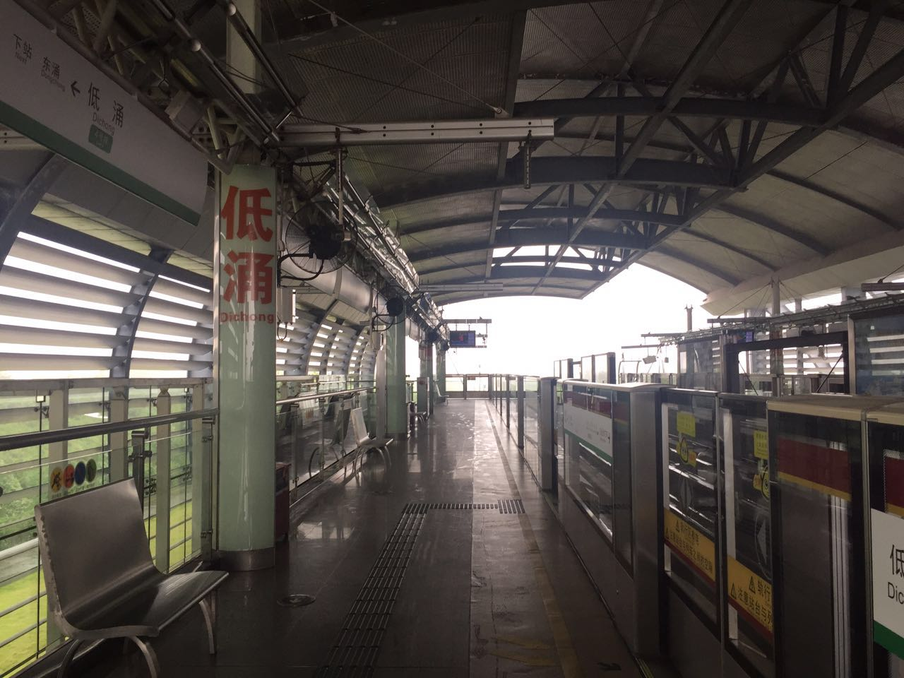 广州地铁低涌站